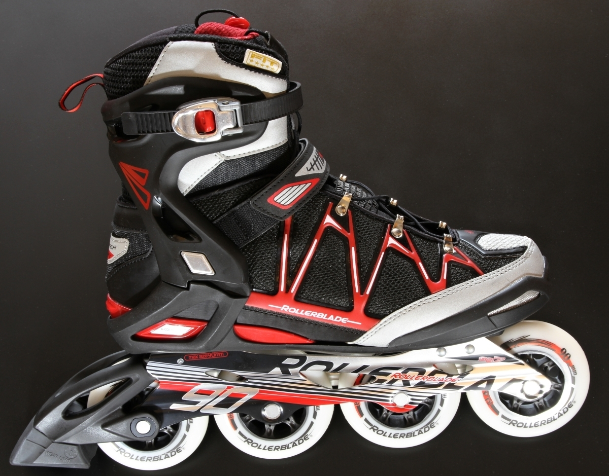 Rollerblade IGNITER S 90